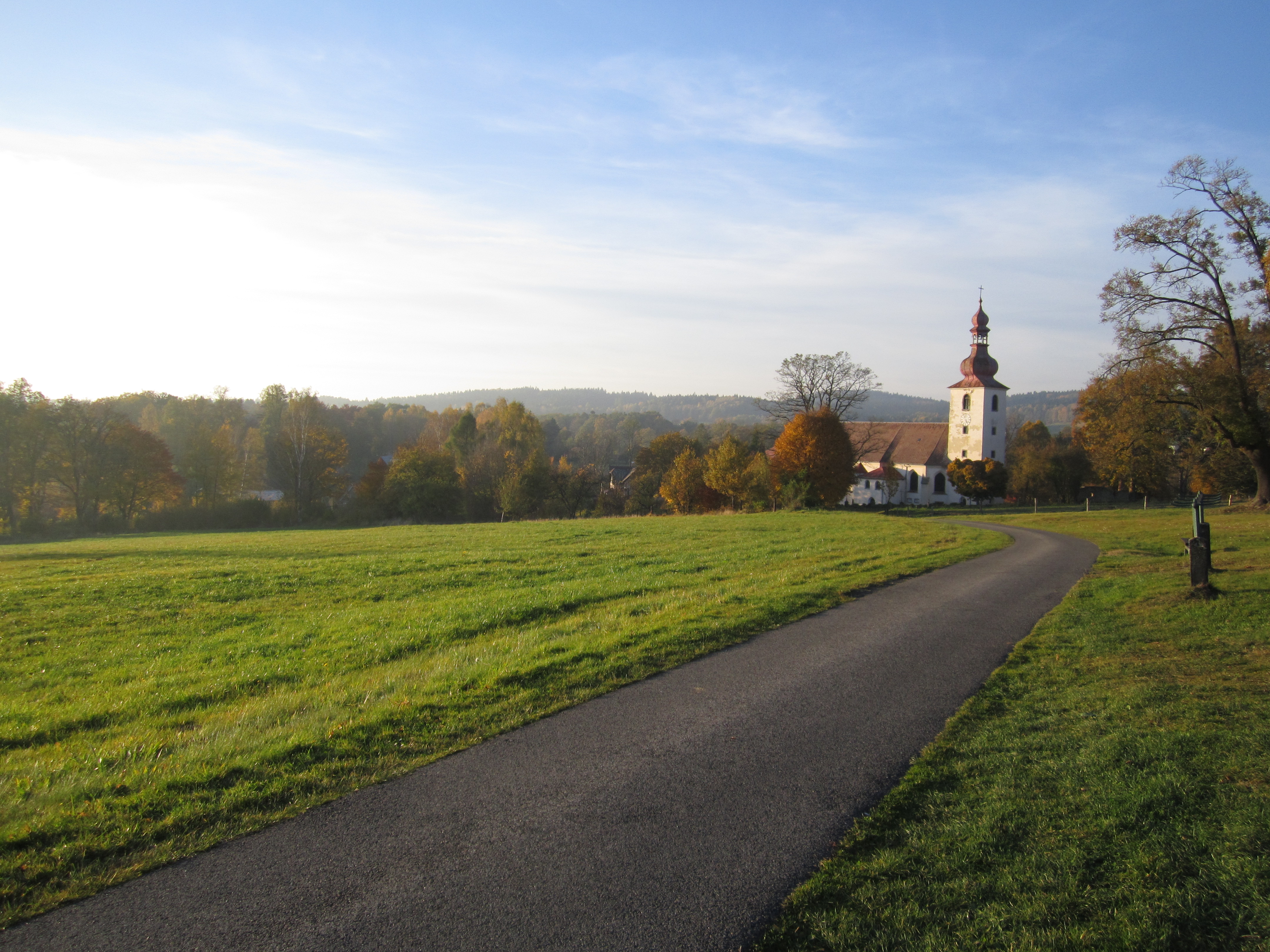 Lipová u Šluknova (fotka od cesty u hřbitova)